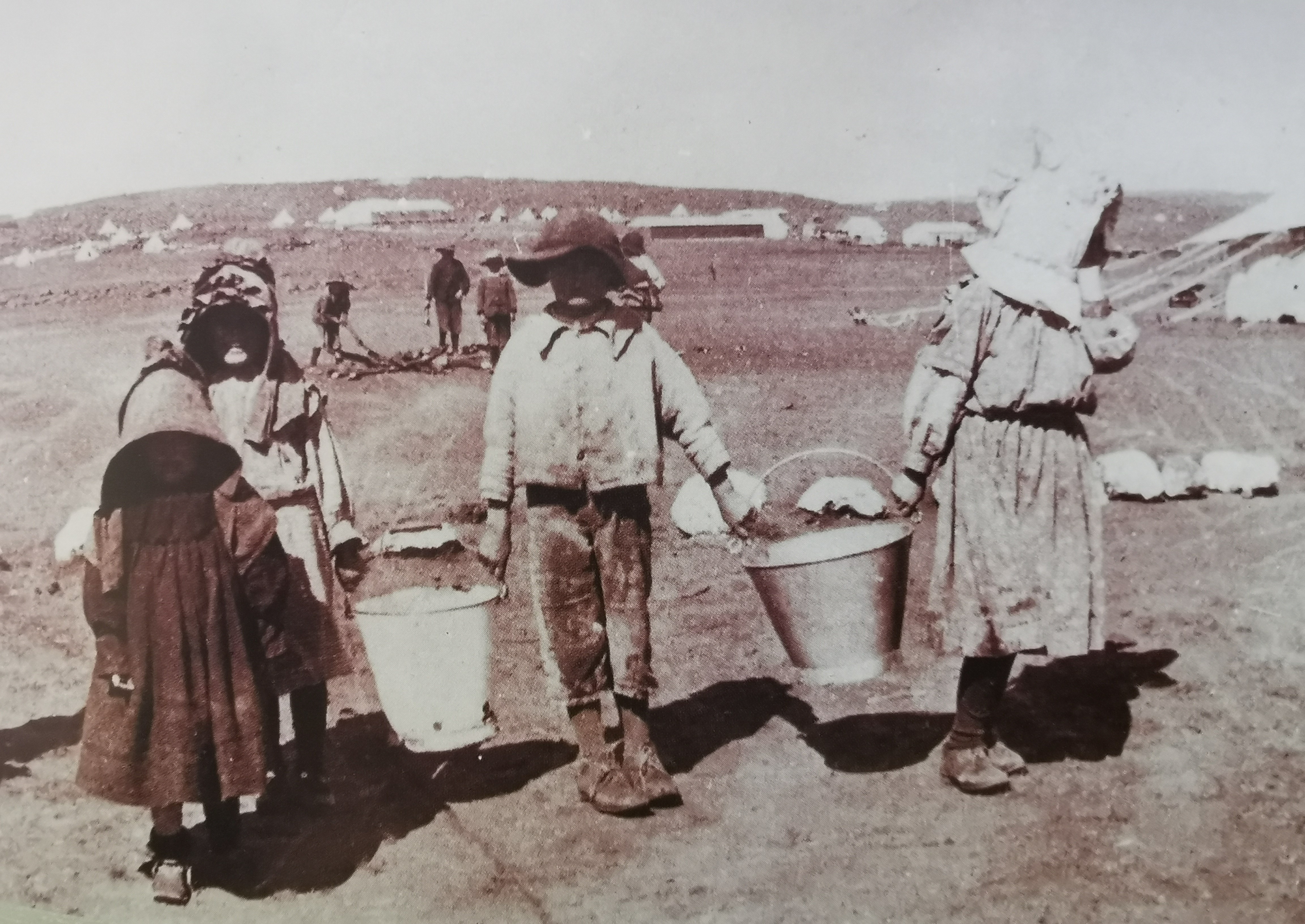 Kinders wag op hul waterrantsoene. Foto: Oorlogsmuseum van die Boererepublieke